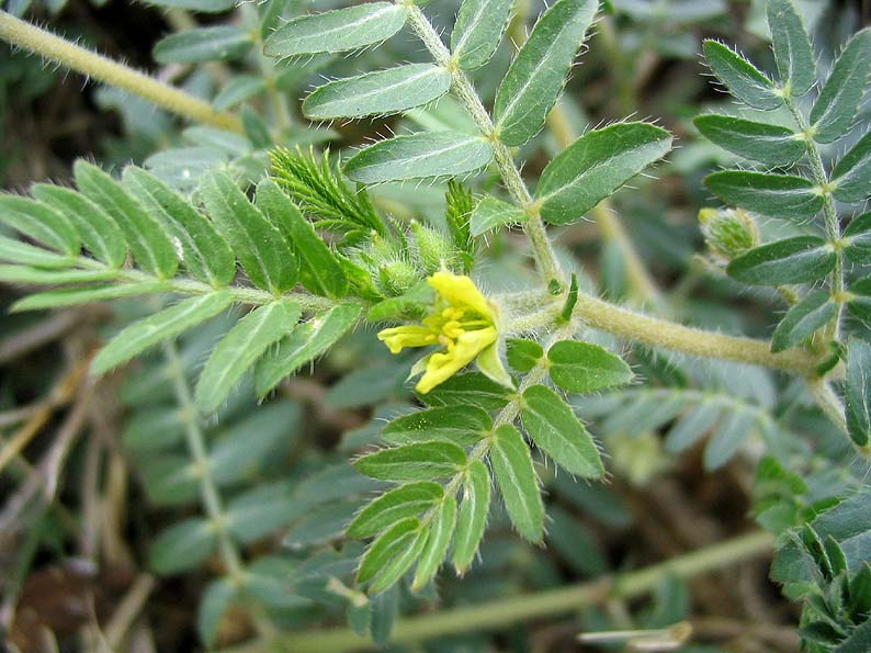 Tribulus terrestris (tribule terrestre, croix-de-Malte) Photo prise à Ille-sur-Têt le 25/08/04 Jean Tosti 09/2004